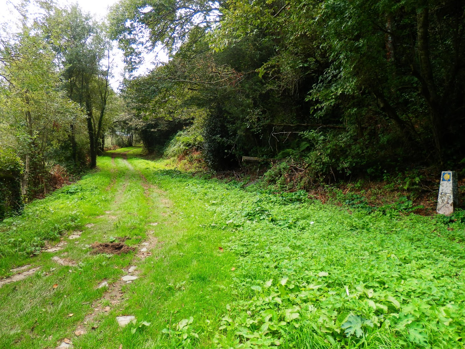 Ver título.